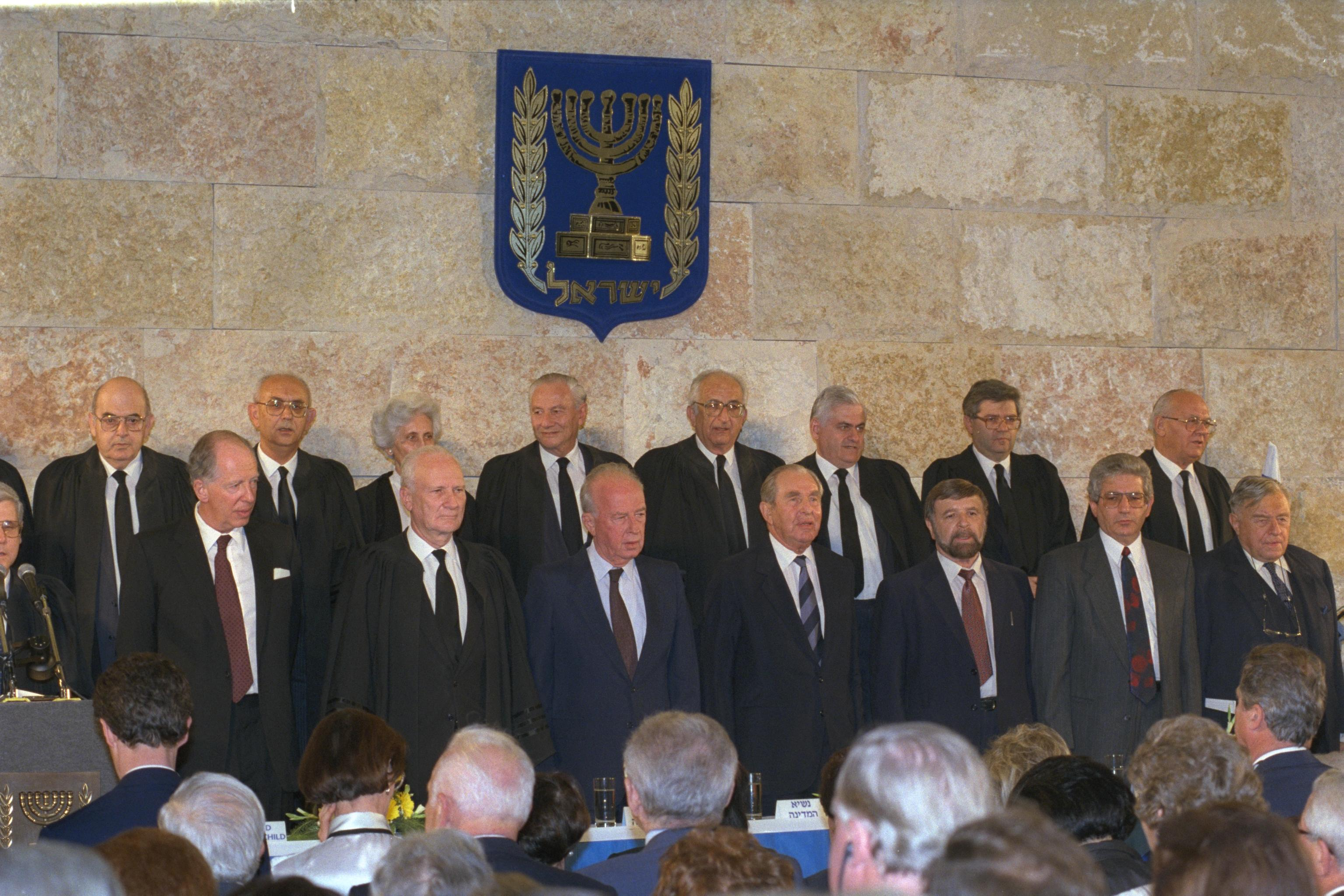 Prime Minister Yitzhak Rabin and President Haim Herzog during the inauguration of the Supreme Court Building in Jerusalem. ראש הממשלה, יצחק רבין ונשיא המדינה, חיים הרצוג, במהלך חנוכת מיקומו החדש של בית המשפט העליון